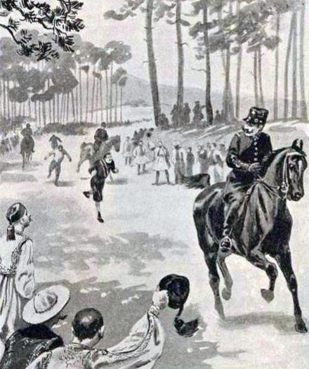 Dessin de la course du Marathon aux JO 1896, par Raymond de la Nézière (1896, d'après photographies de son frère G. de la Nézière).